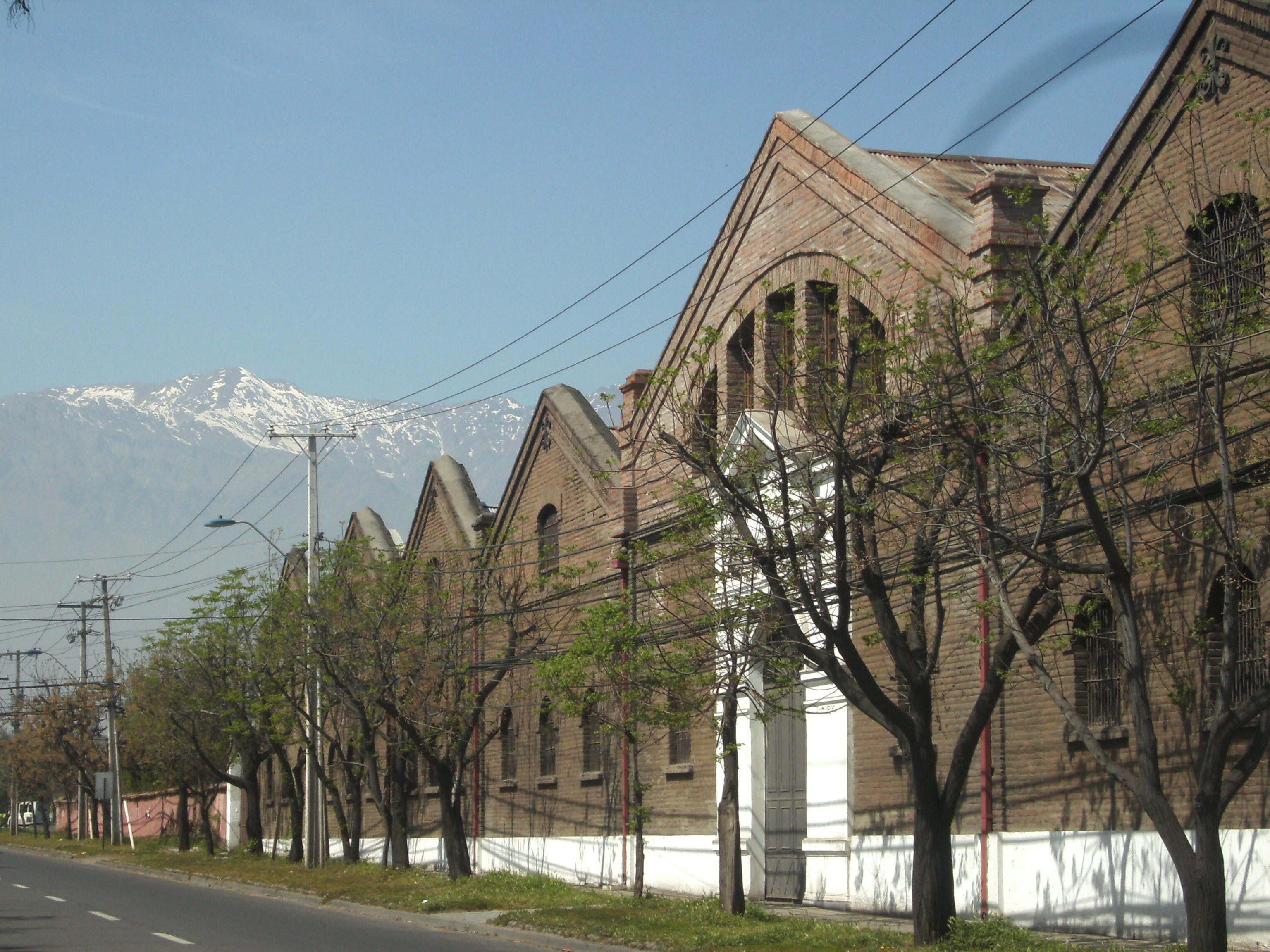 Antiguas bodegas y embotelladora de vivos de calle Rodrigo de Araya 1431, antiguamente rodeadas de viñas hoy en medio de la ciudad. This is a photo of a national monument in Chile: 1252